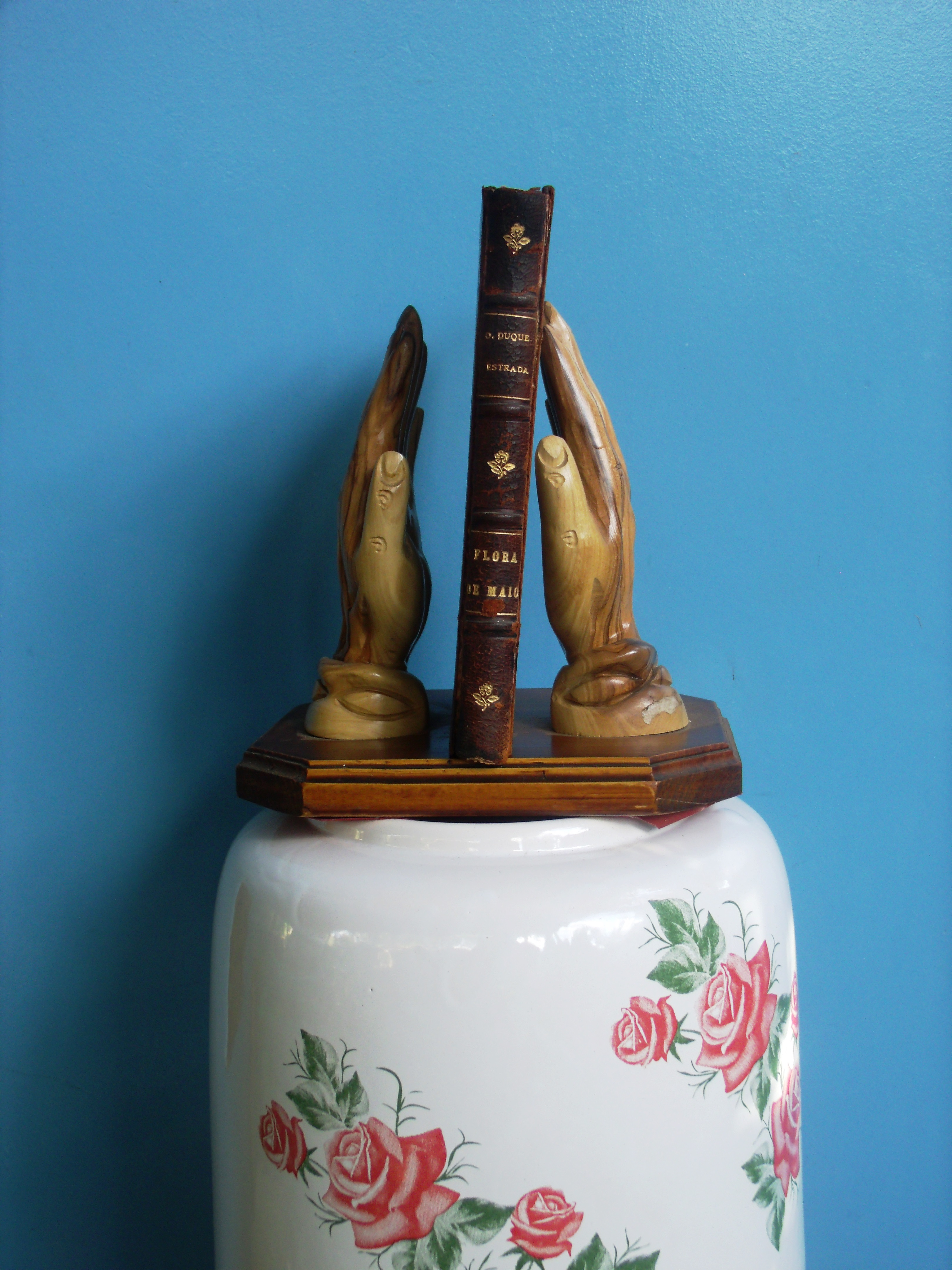 Flora de maior, de Osório Duque-Estrada, edição de 1902.